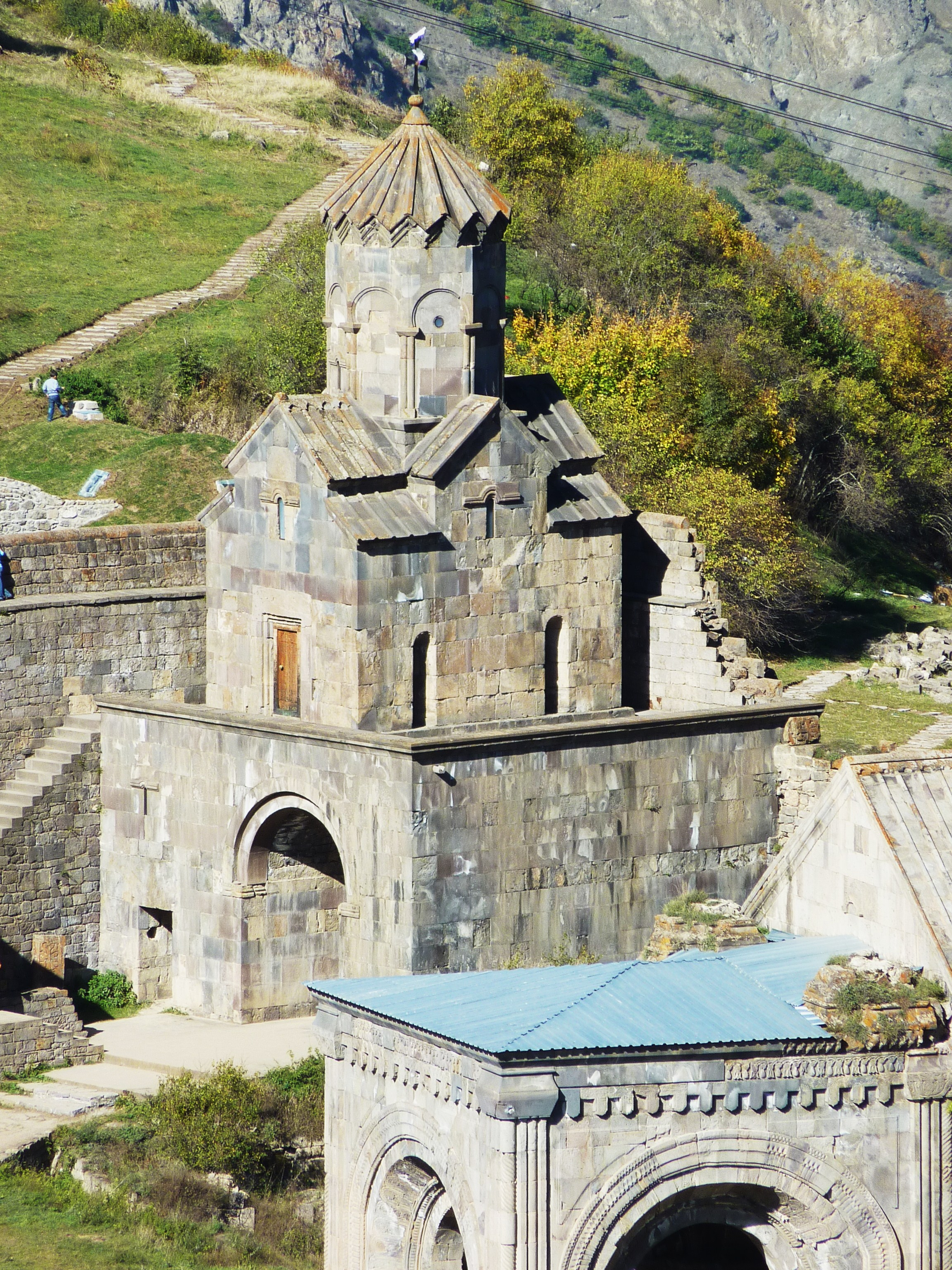 Le monastère de Tatév : église Sainte-Mère-de-Dieu [Sourp Asdvadzadzine]